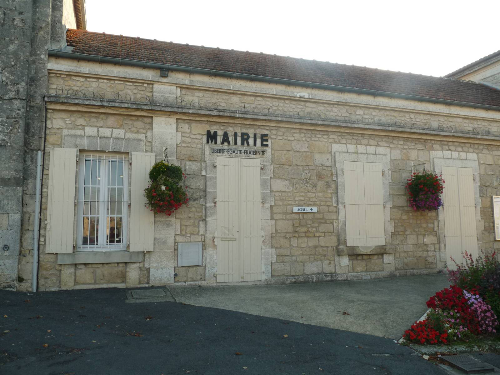 mairie de Vindelle (16), France